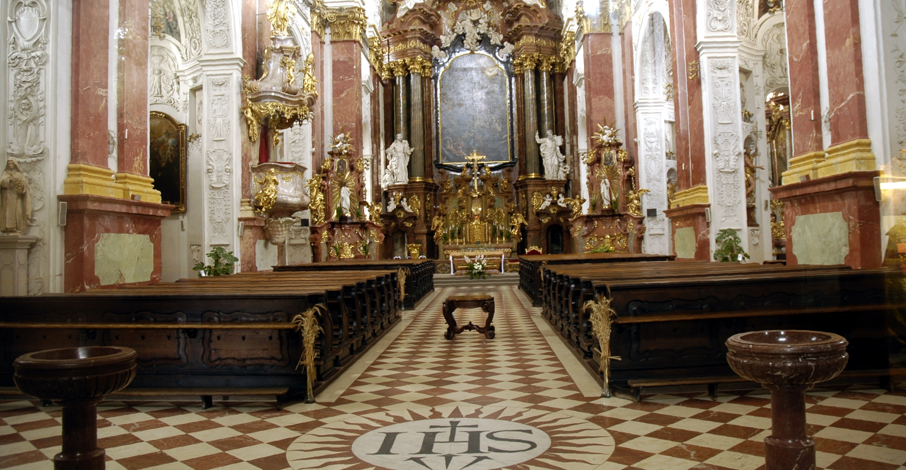 Innenansicht der Heiligen Ignaz Kirche von Prag am Karlsplatz der Jesuiten die in den Jahren 1655 bis 1677 nach dem Entwurf von Carlo Lurago errichtet wurd. In dieser Zeit führten die Jesuiten auch die damals österreichische Prager Karl-Ferdinands-Universität. (Thomas Rygl, Prag, ISBN 80-86893-51-0)